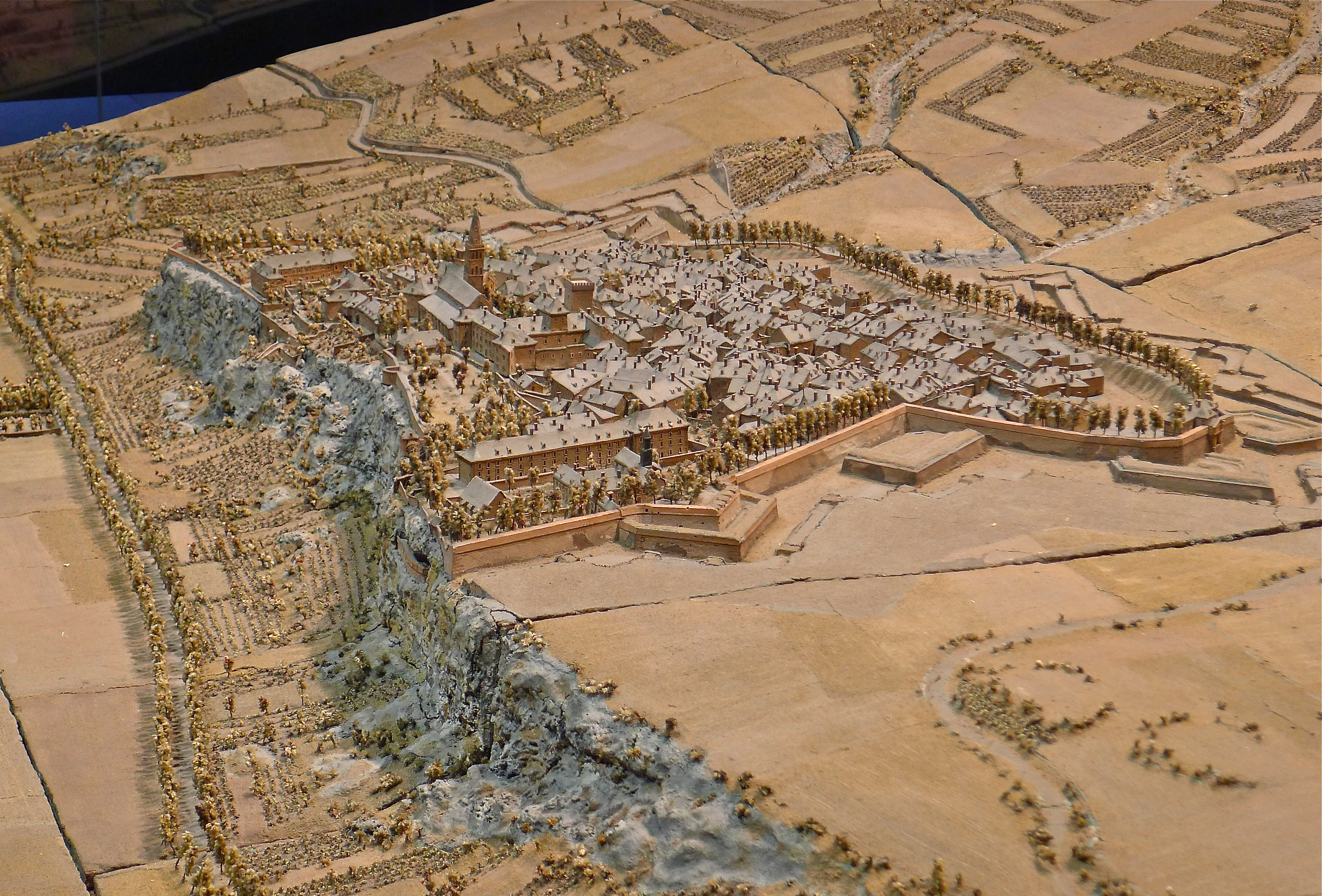 Plan-relief de la ville d'Embrun dans son état de 1701. Plan-relief construit vers 1701. Échelle 1/600e